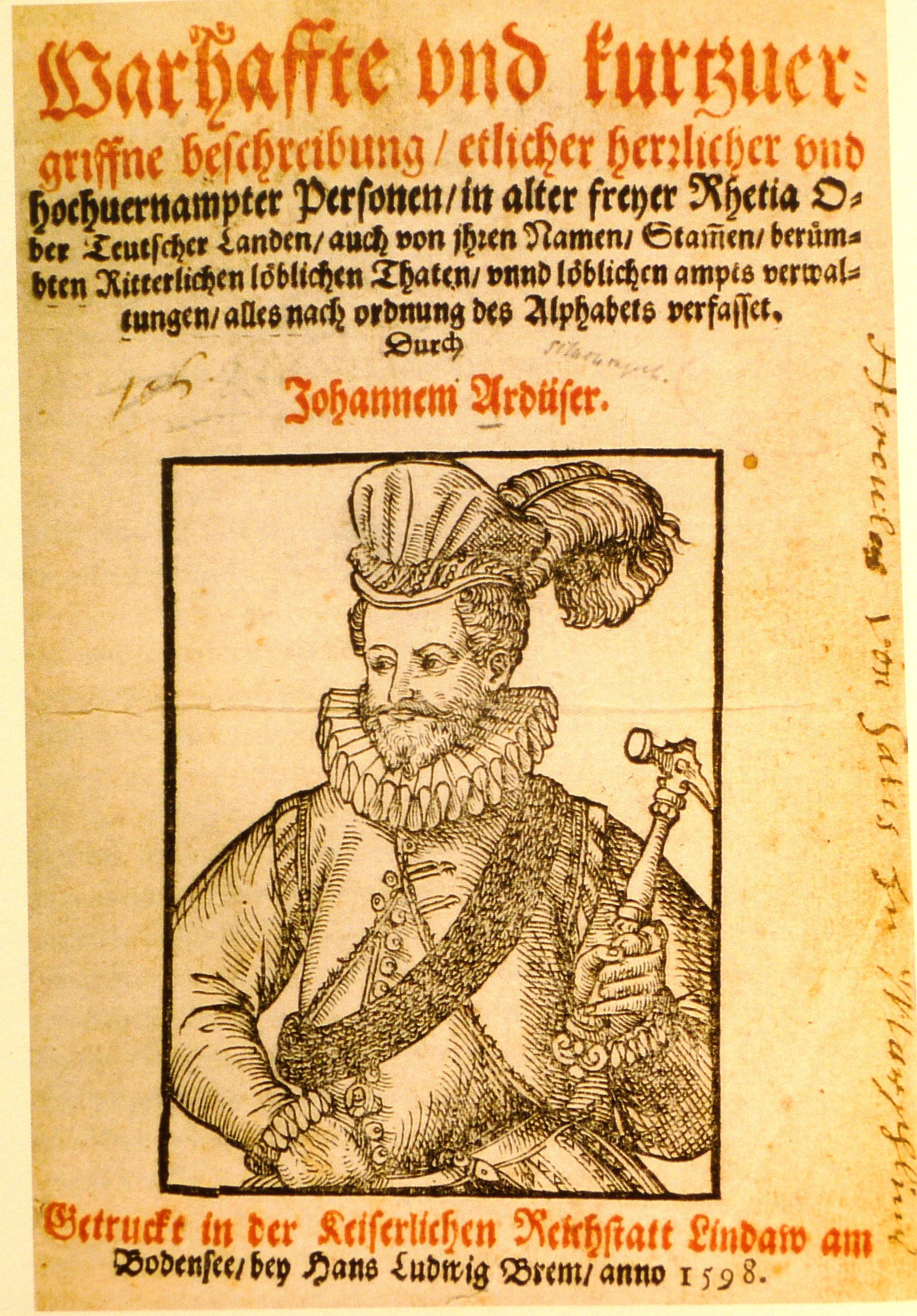 Umschlag der Autobiografie von Hans Ardüser